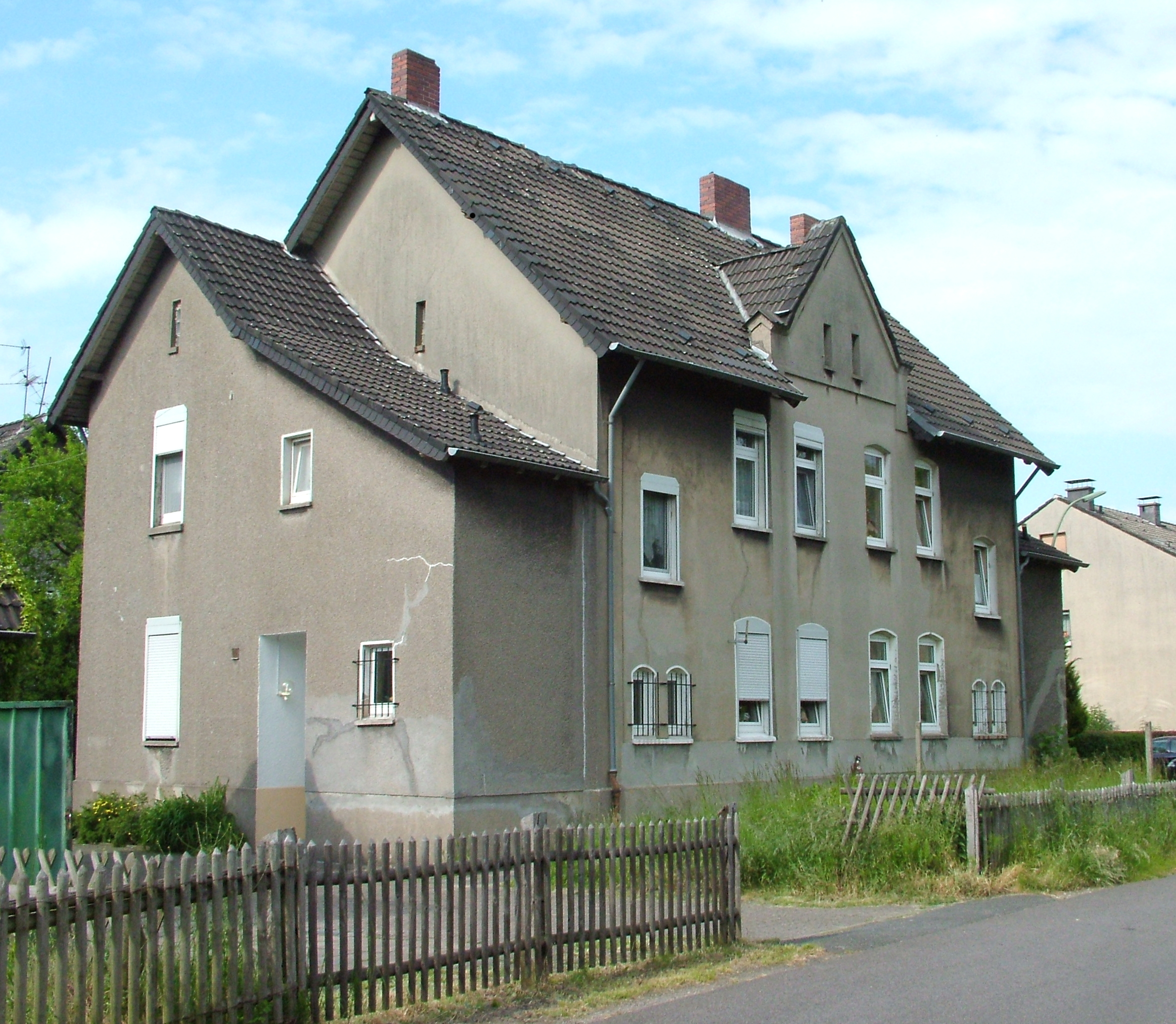 Gladbeck-Rentfort: Haus an der Ecke Kampstraße / Johowstraße. Bergschäden.